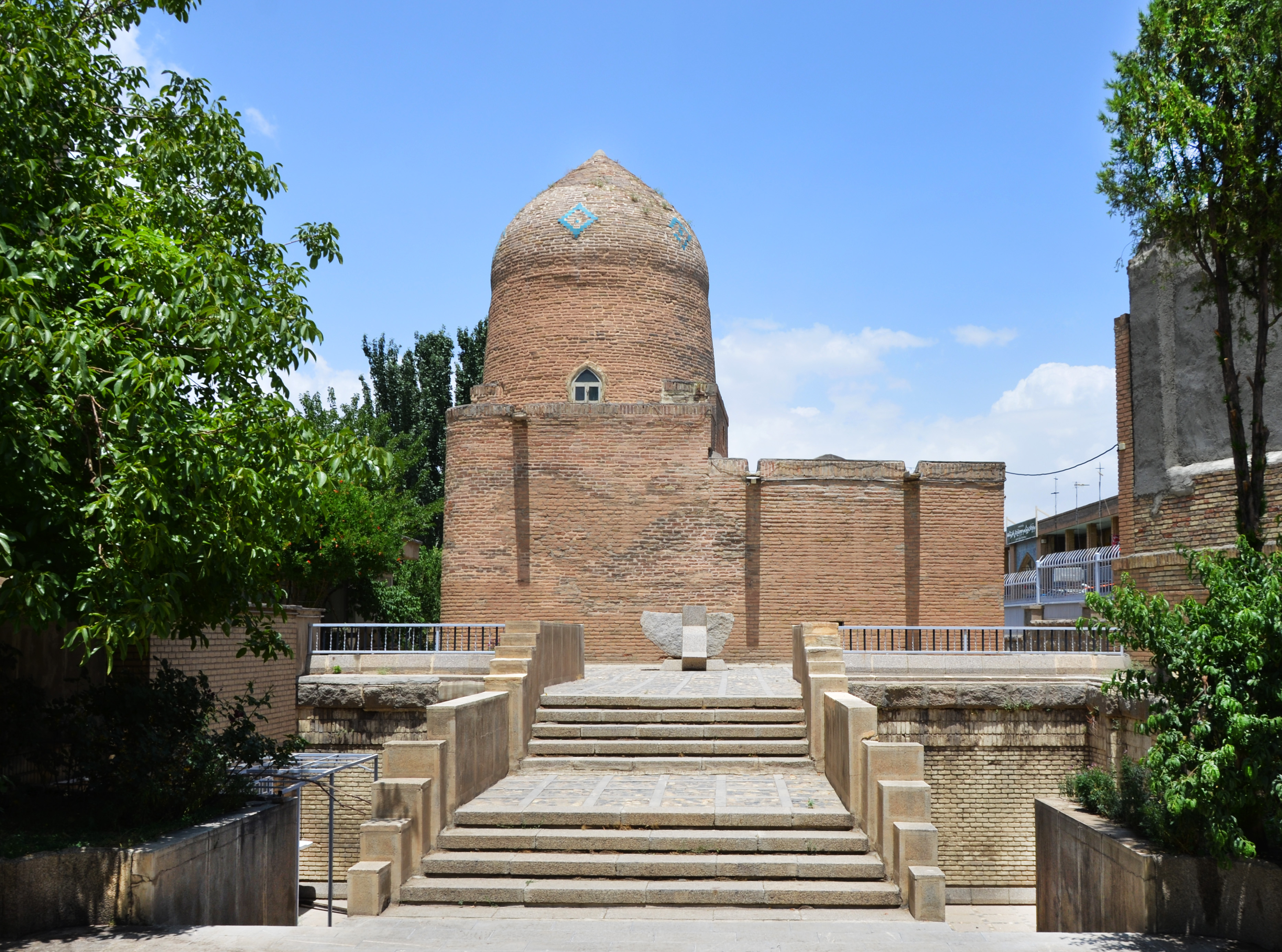 آرامگاه استر و مردخای